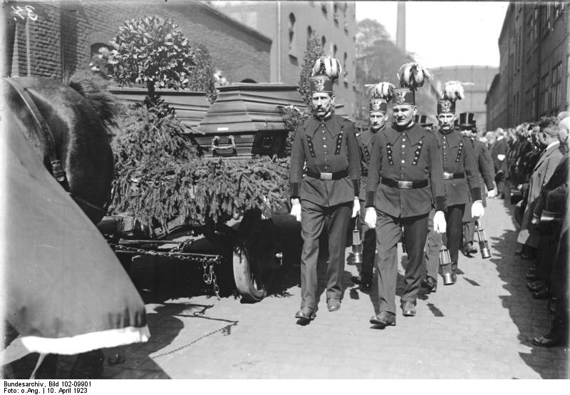 Zur Befreiung des besetzten Gebietes am 30. Juni 1930! Ein interessanter Rückblick aus der schweren Zeit im besetzten Gebiet. Die feierliche Beisetzung der Essener Opfer am 10. April 1923 vom Kruppwerk aus.